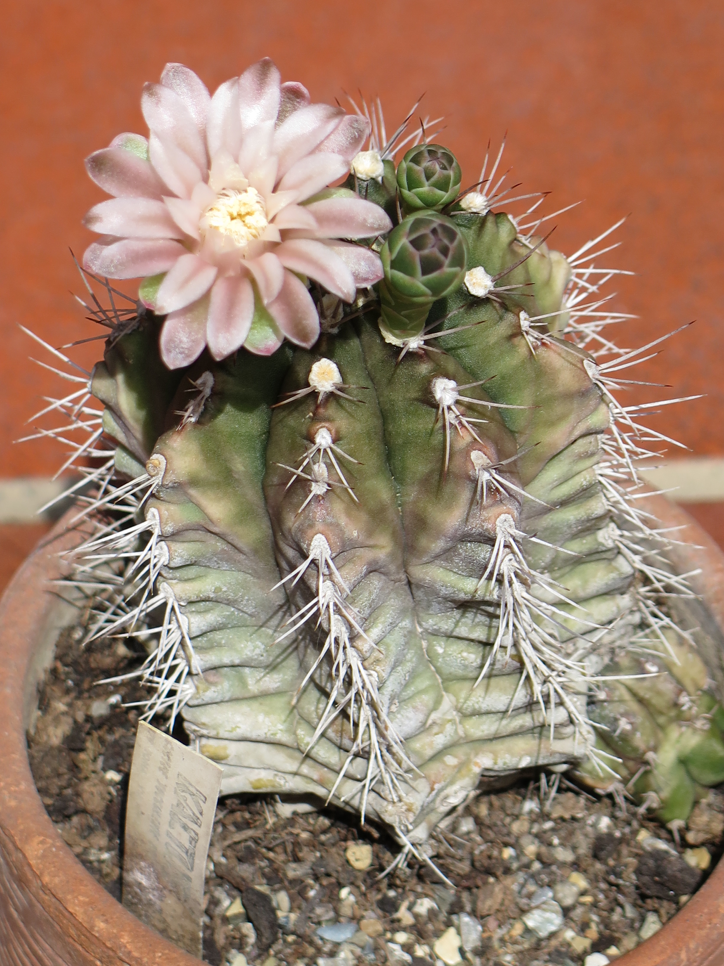 Un vecchio gymnocalycium mihanovichii